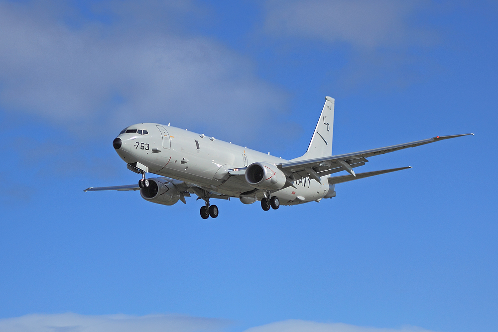 Boeing P-8A Poseidon 168763